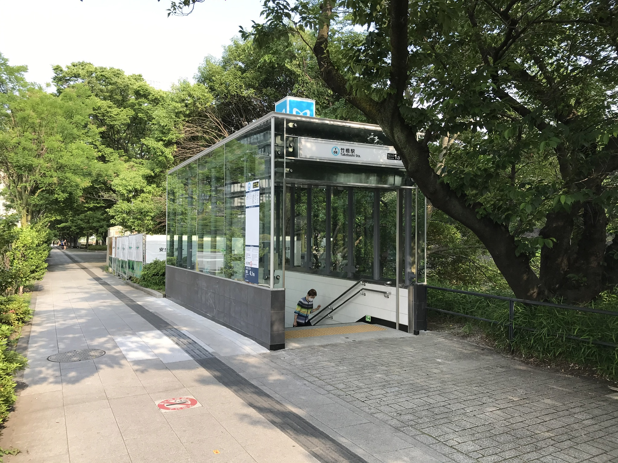 東京メトロ東西線竹橋駅1a番出入口